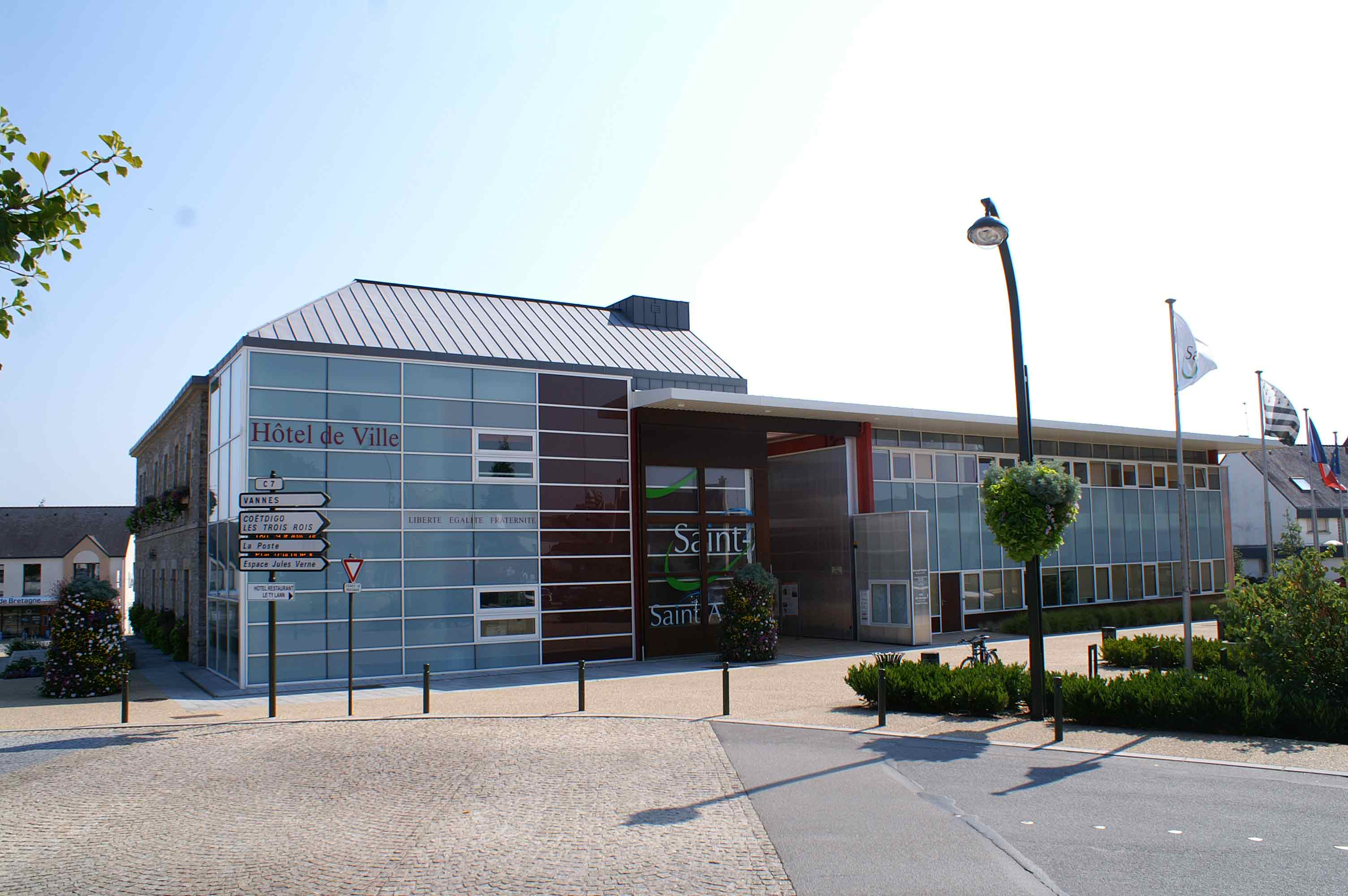 L'Hôtel de Ville de Saint-Avé dans le Morbihan. On voit la façade de l'ancienne mairie, intégrée dans le nouveau bâtiment construit, au début des années 2000.